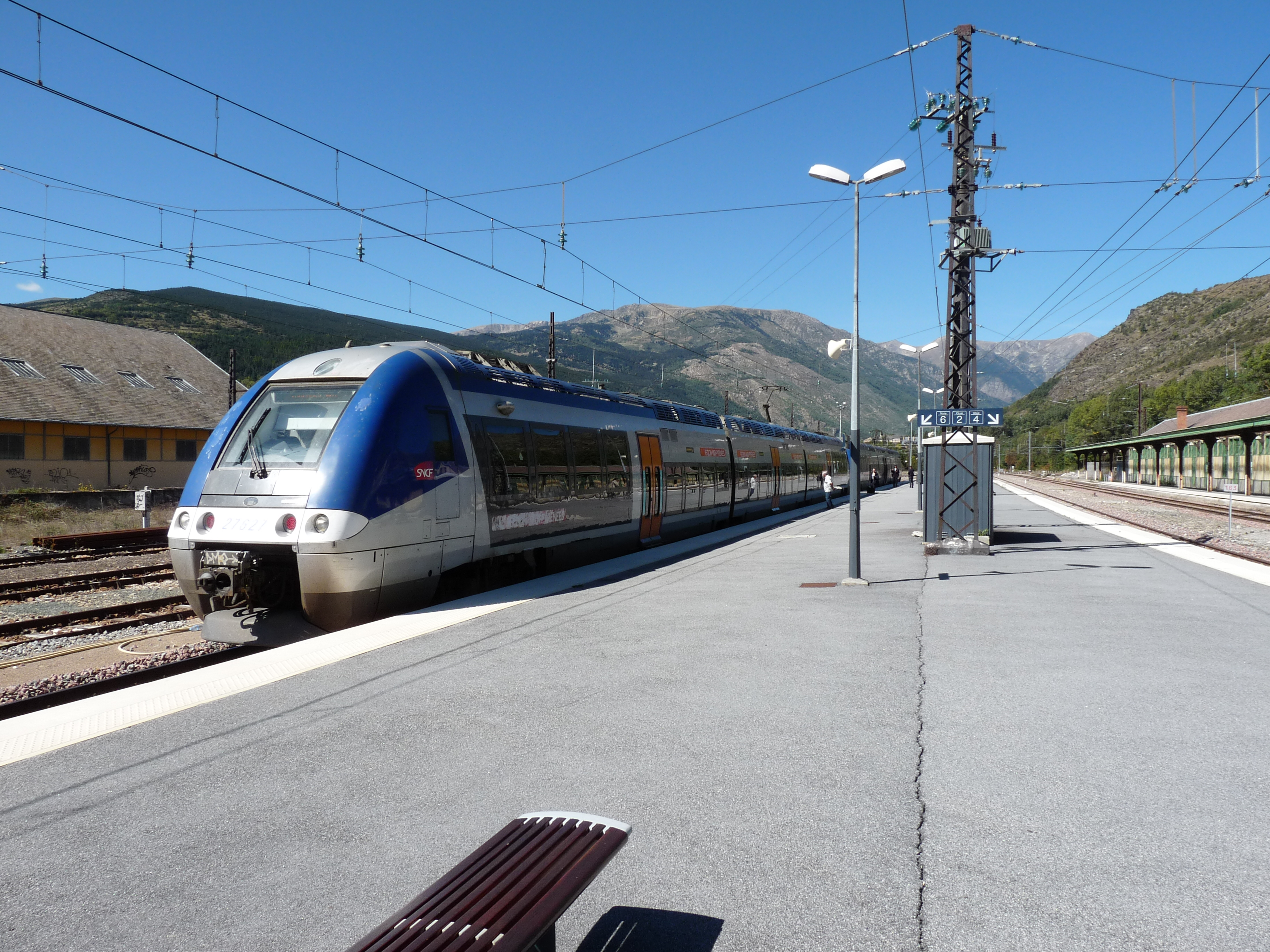 Een TER trein klaar voor vertrek naar Toulouse